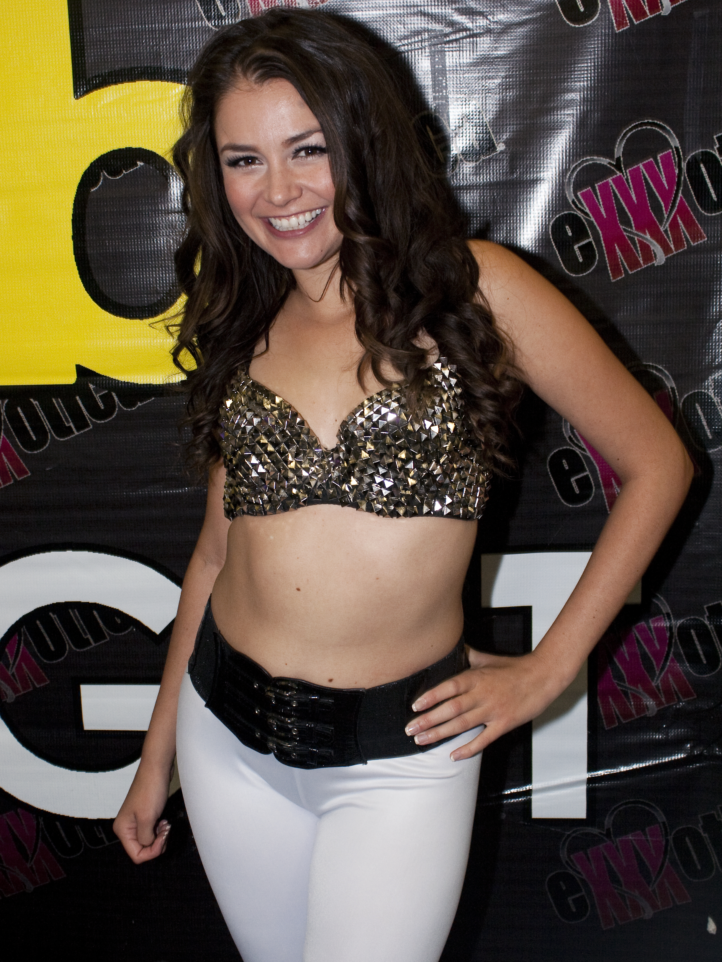 ExxxNJ14_078bas